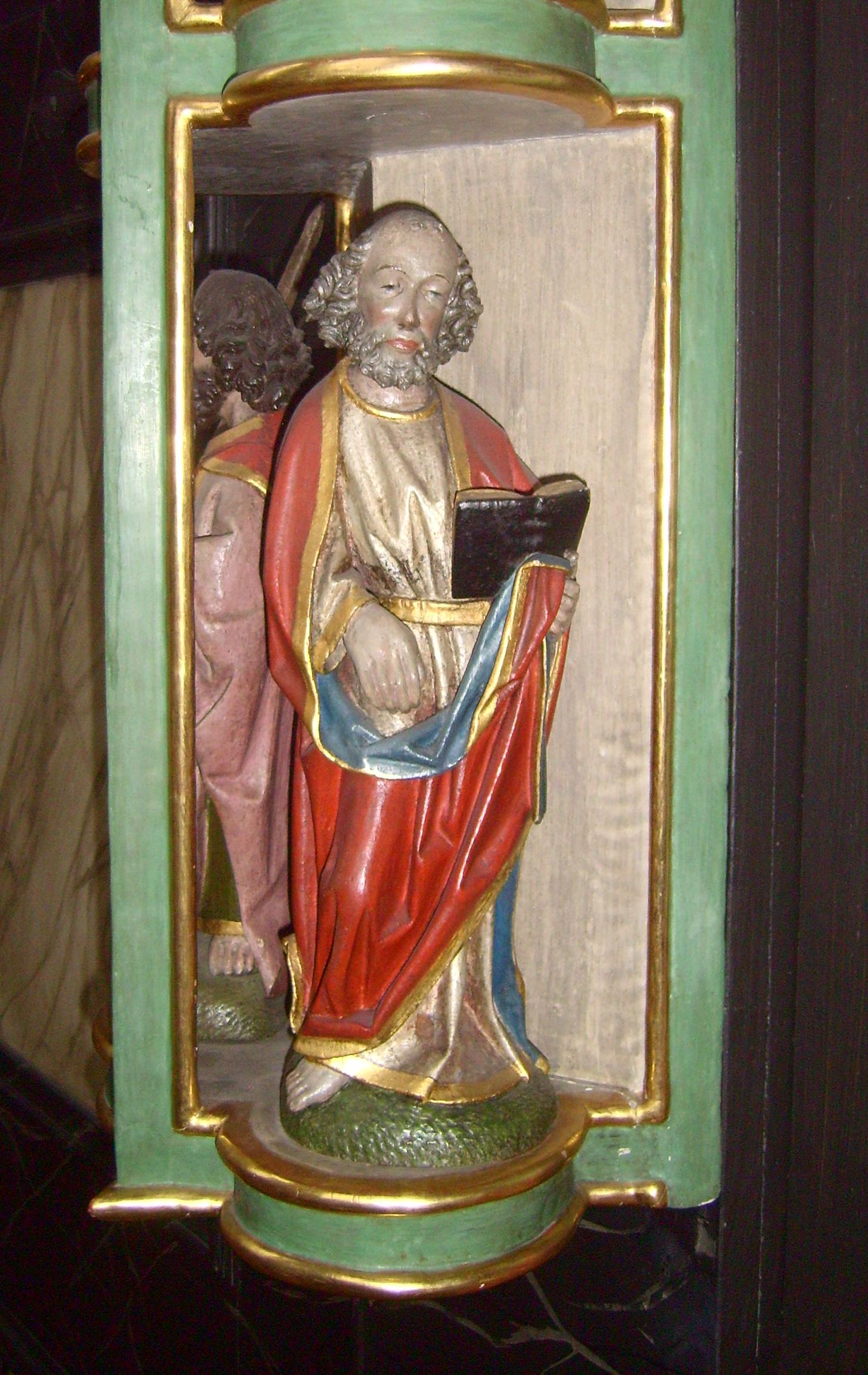 Kloster Oelinghausen, gotische Apostelfigur am Johannesaltar auf der Nonnenempore